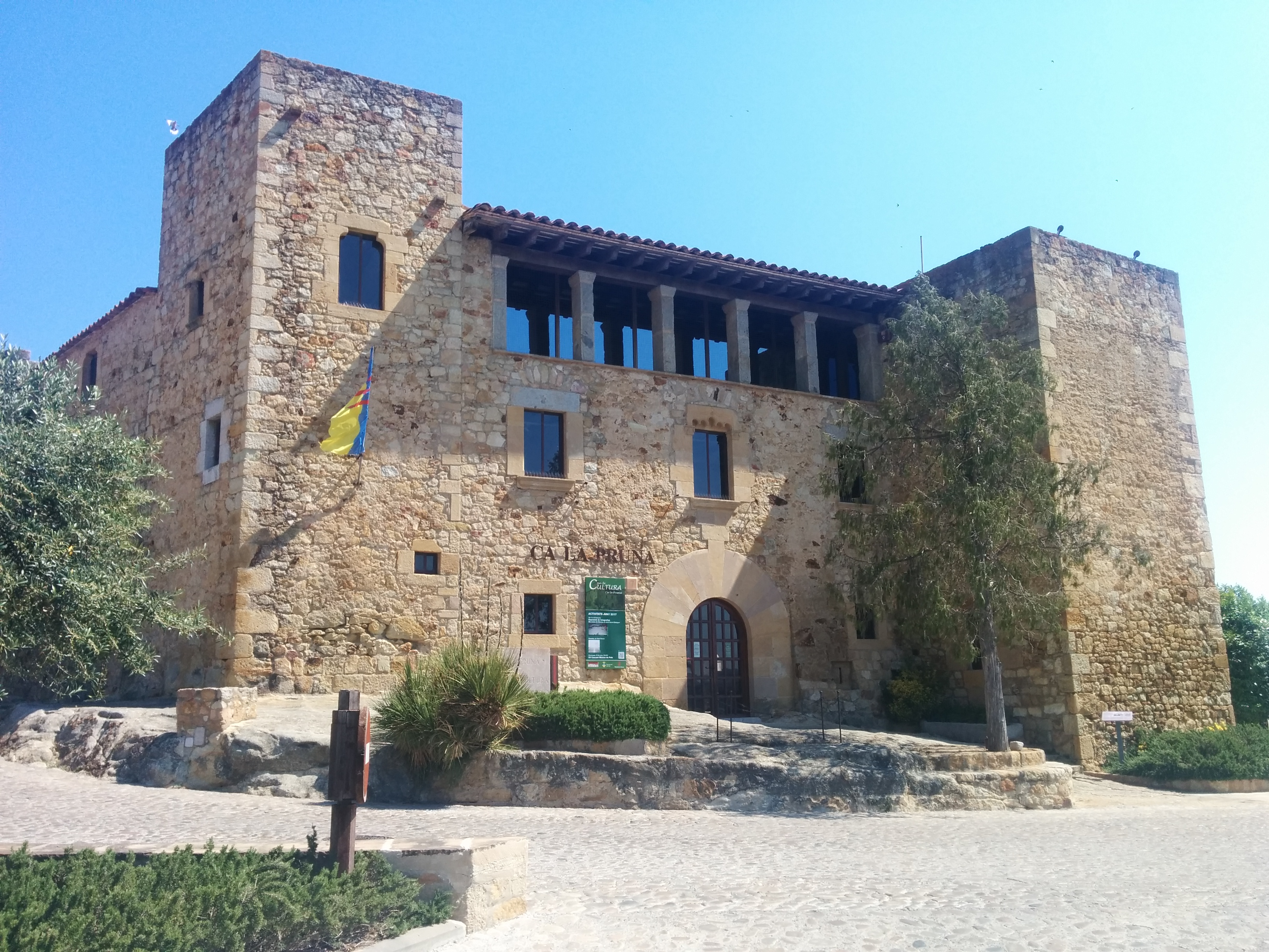 Ca la Pruna és una casa fortificada del segle XVI, situada extramurs al començament del municipi de Pals (Baix Empordà),[1] i inclosa en l'Inventari del Patrimoni Arquitectònic de Catalunya.